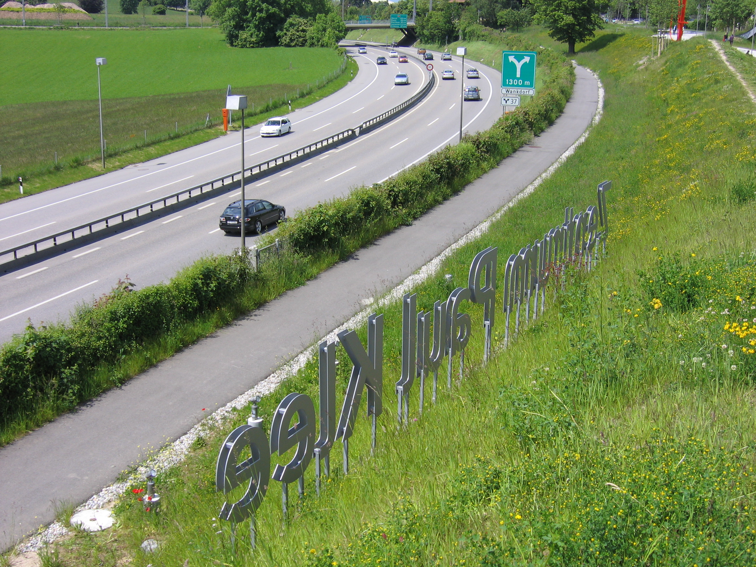 Zentrum Paul Klee, Bern. Architekt: Renzo Piano.